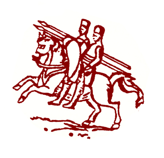 Chevalier du Temple/ ovdt